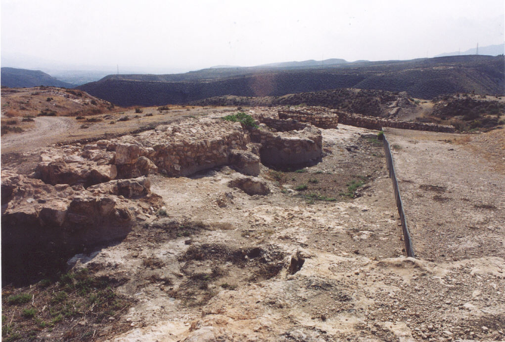 Los Millares, lienzo de muralla (Yacimiento Arqueológico de Los Millares, Gador, Almería)